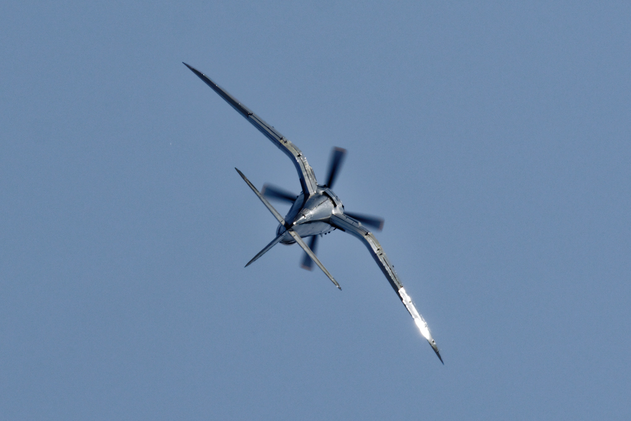 Le F4U-5N des casques de cuir lors du meeting de Melun 2018